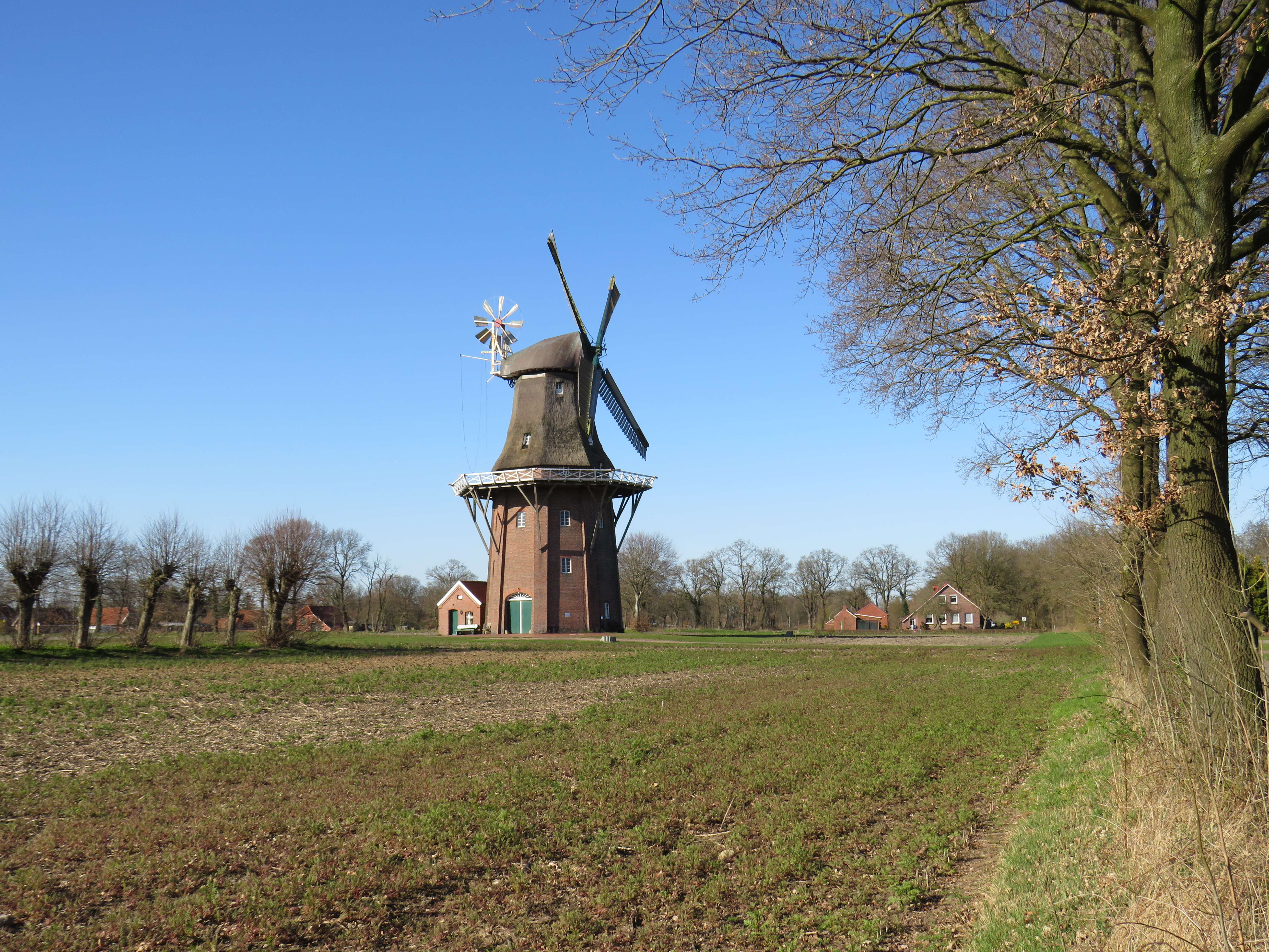 Galerieholländer Windmühle in Holtland, Mühlenstraße 17